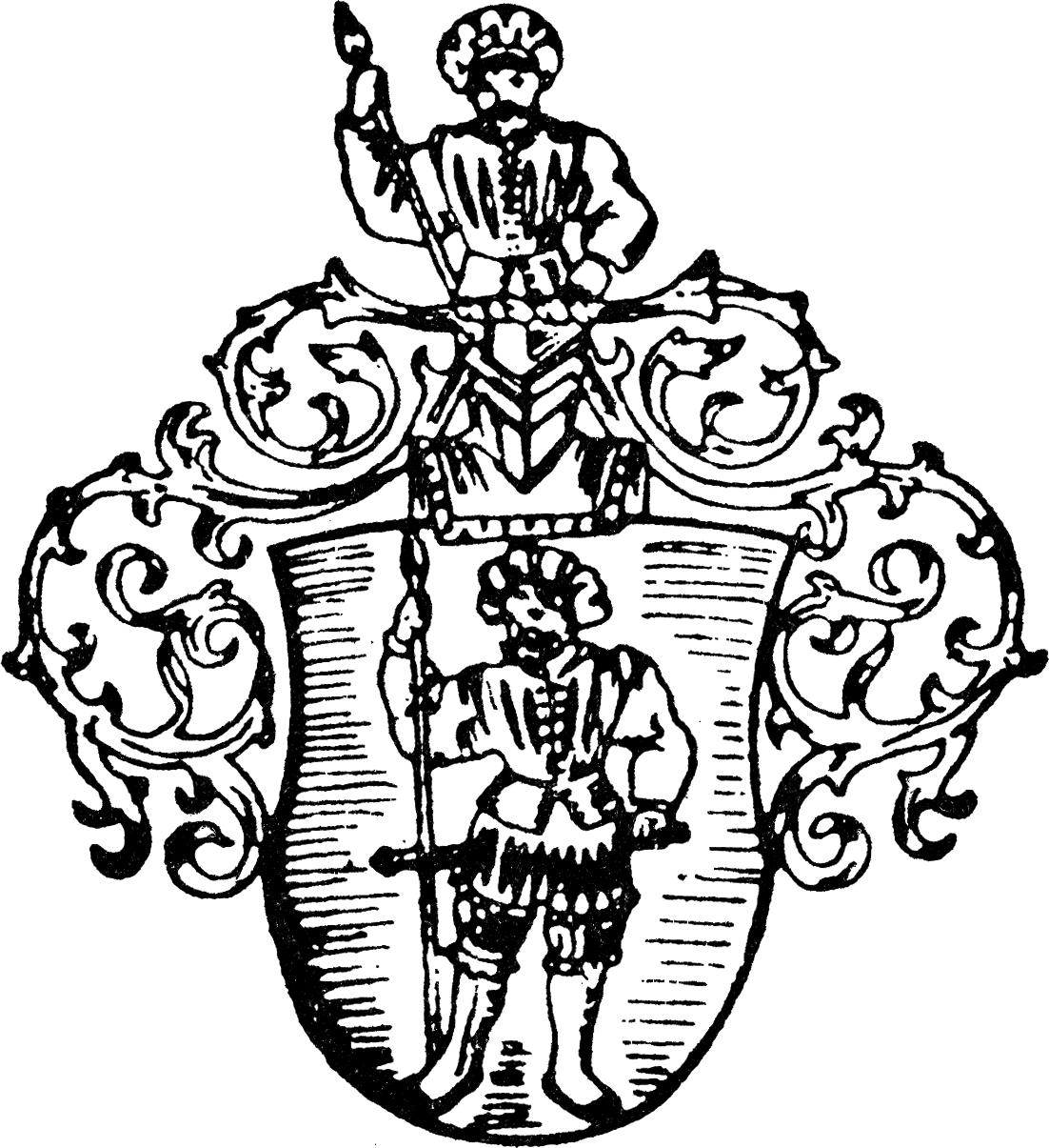 Wappen von Grebenau